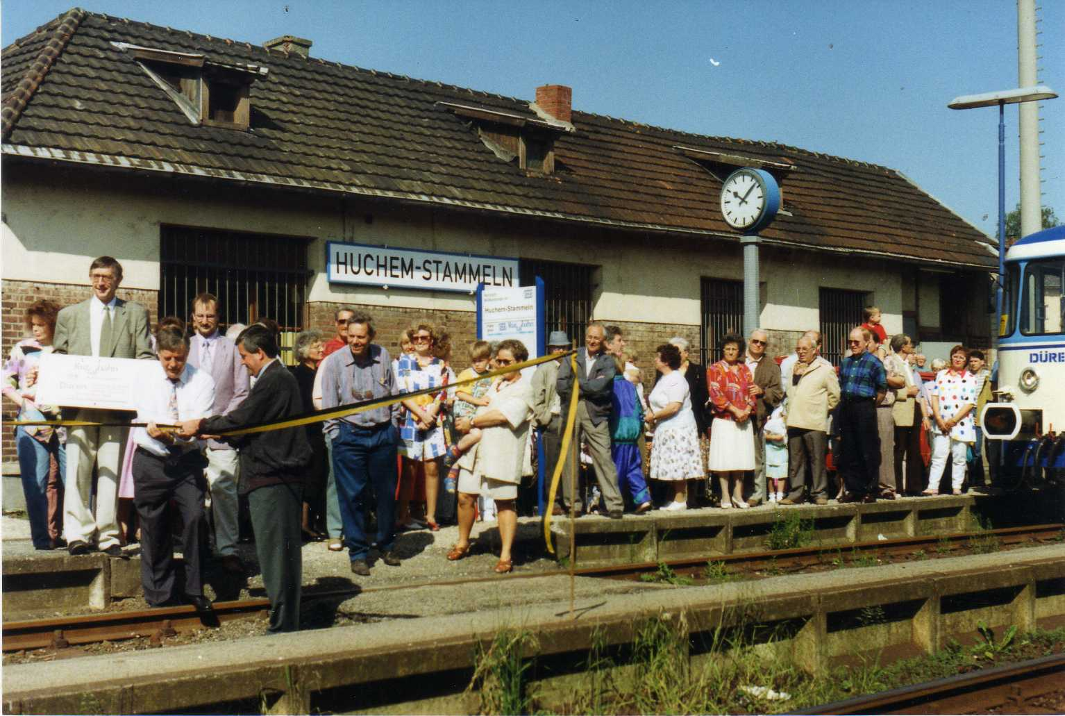 Der DKB-Eröffnungszug legte am 23. Mai 1993 in Huchem-Stammeln gemäß Sonderfahrplan von 9.55 bis 10.10 Uhr einen Halt ein und wurde von der örtlichen Politik gebührend gewürdigt. Im Hintergrund das alte, von der Bevölkerung wegen seiner Gitterstäbe gerne "Affenkäfig" genannte Empfangsgebäude der Bundesbahn.